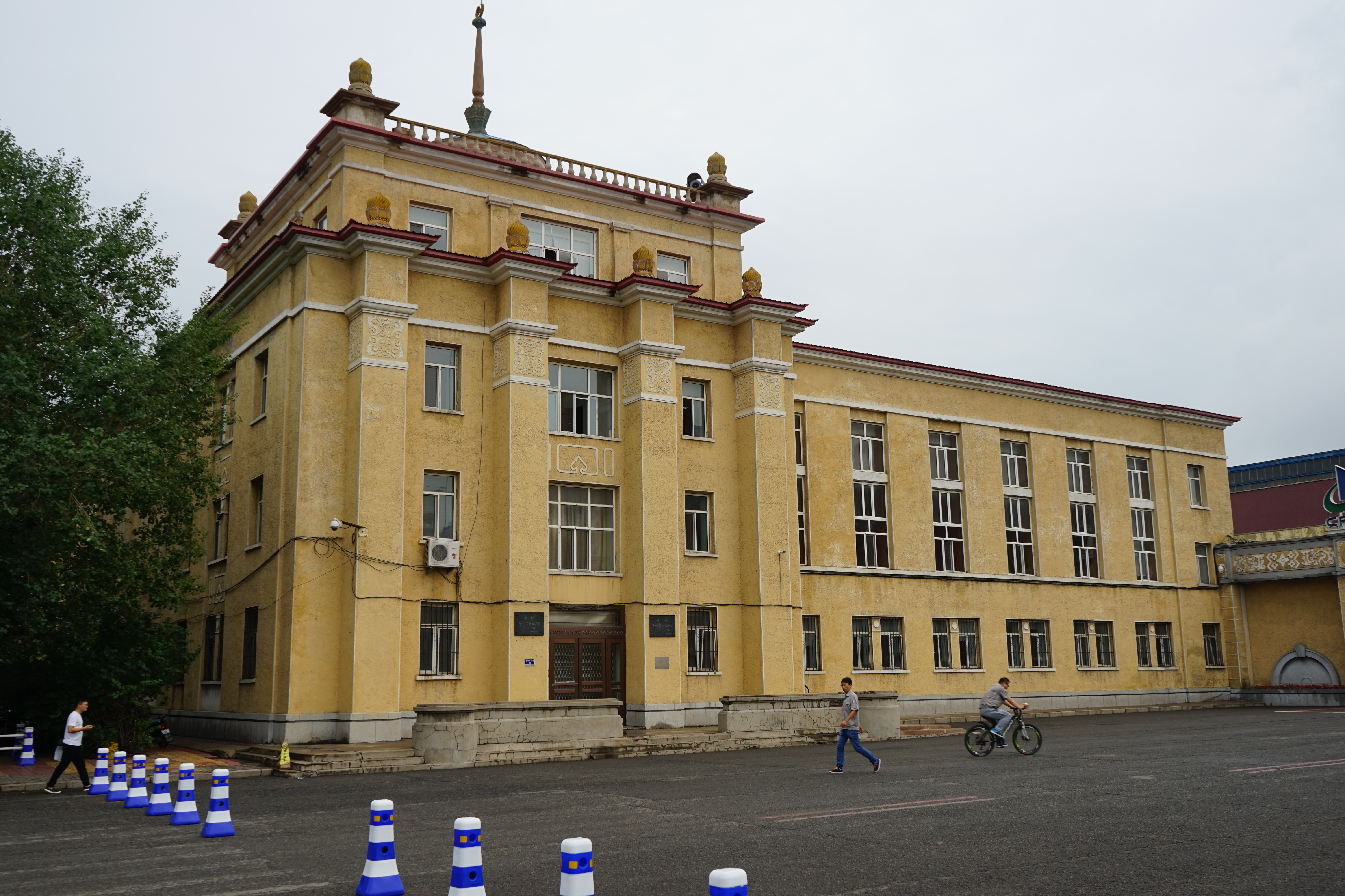 中国一重 一号行政楼 苏式建筑